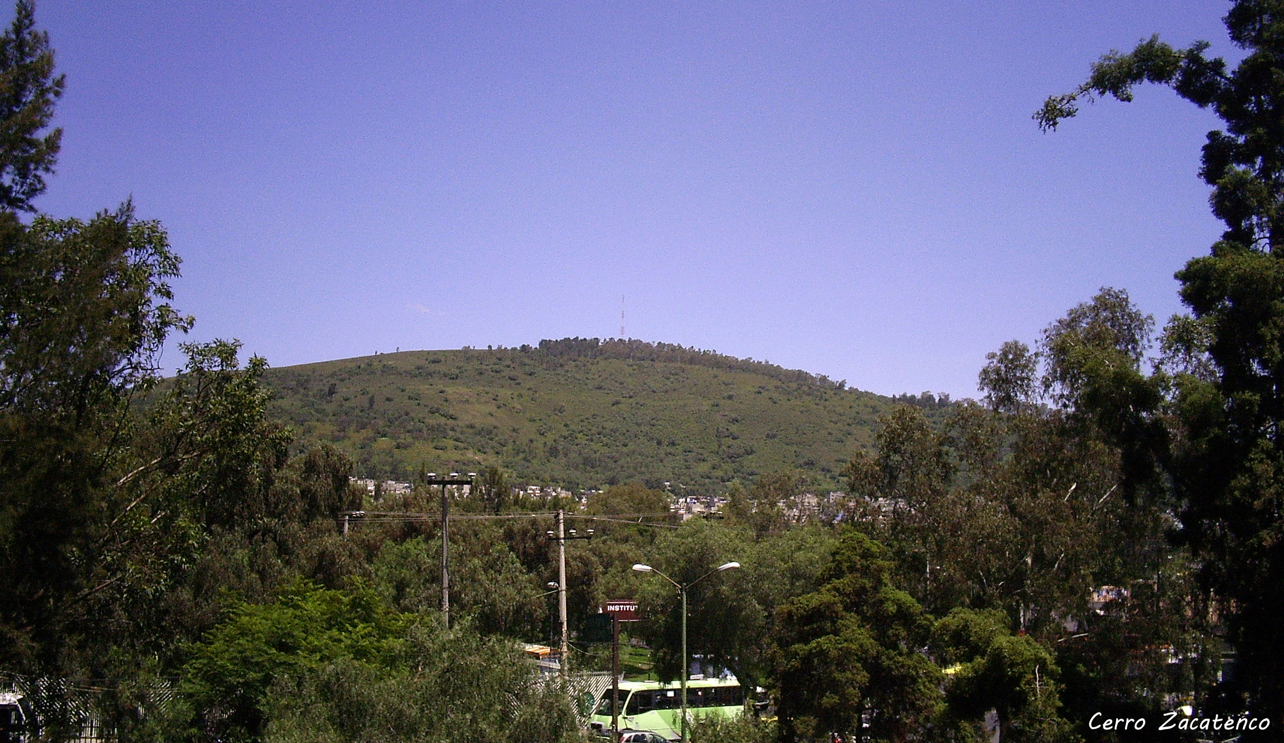 Cerro Zacatenco vista desde el lado del Distrito Federal. Gustavo A. Madero